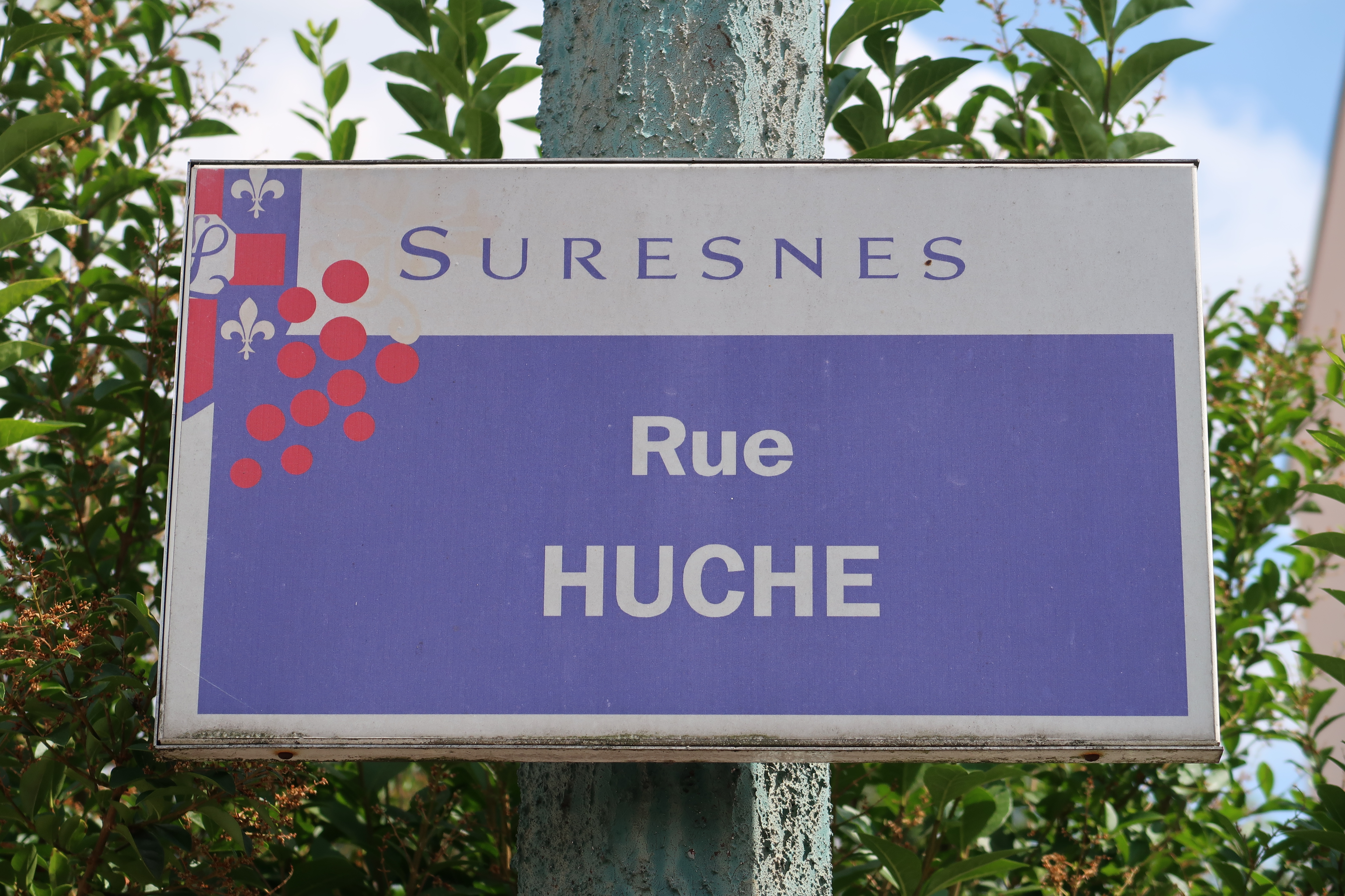 Plaque de la rue Huché à Suresnes (Hauts-de-Seine).